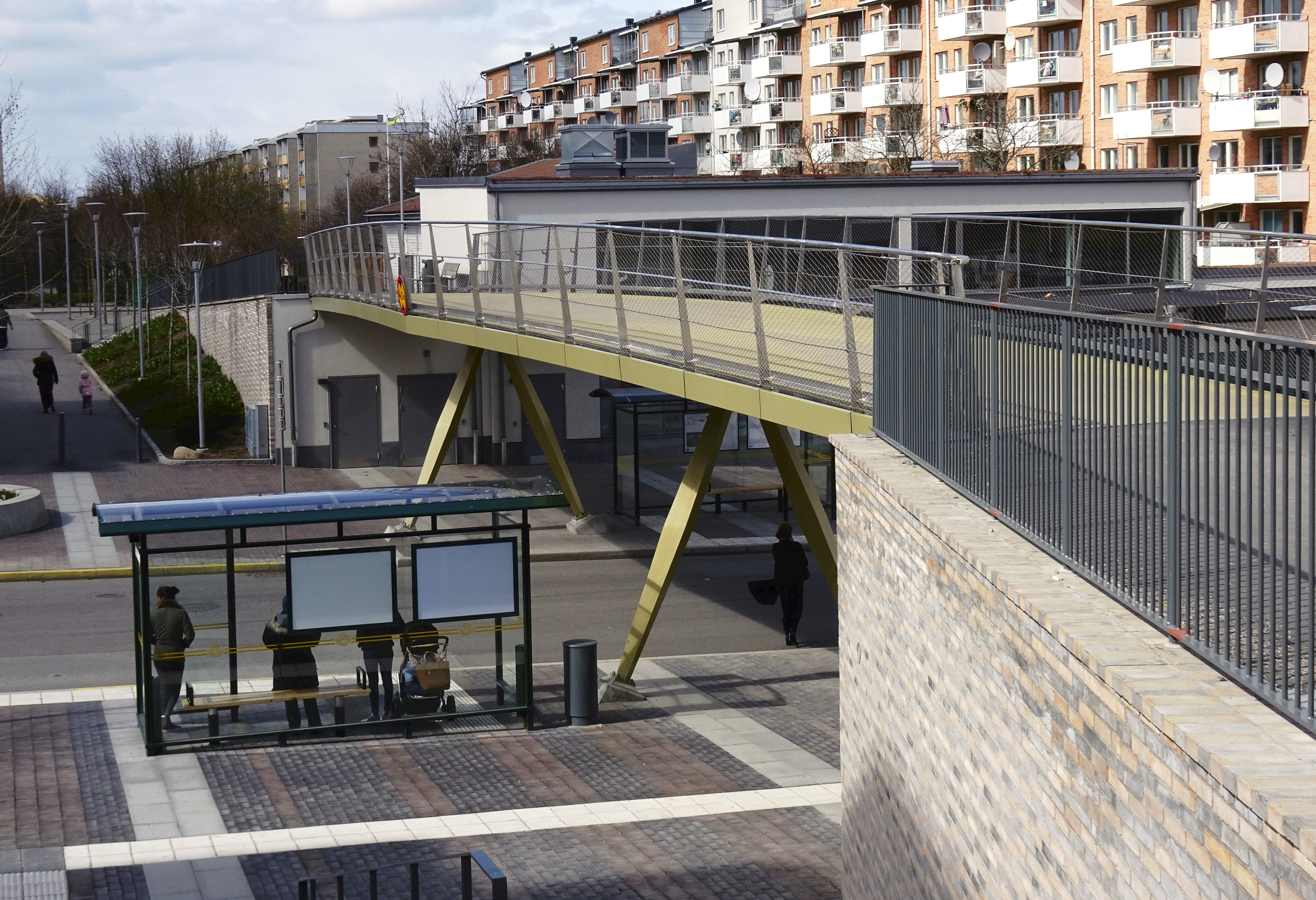 Rinkebystråkets bro, arkitekt &Rundquist